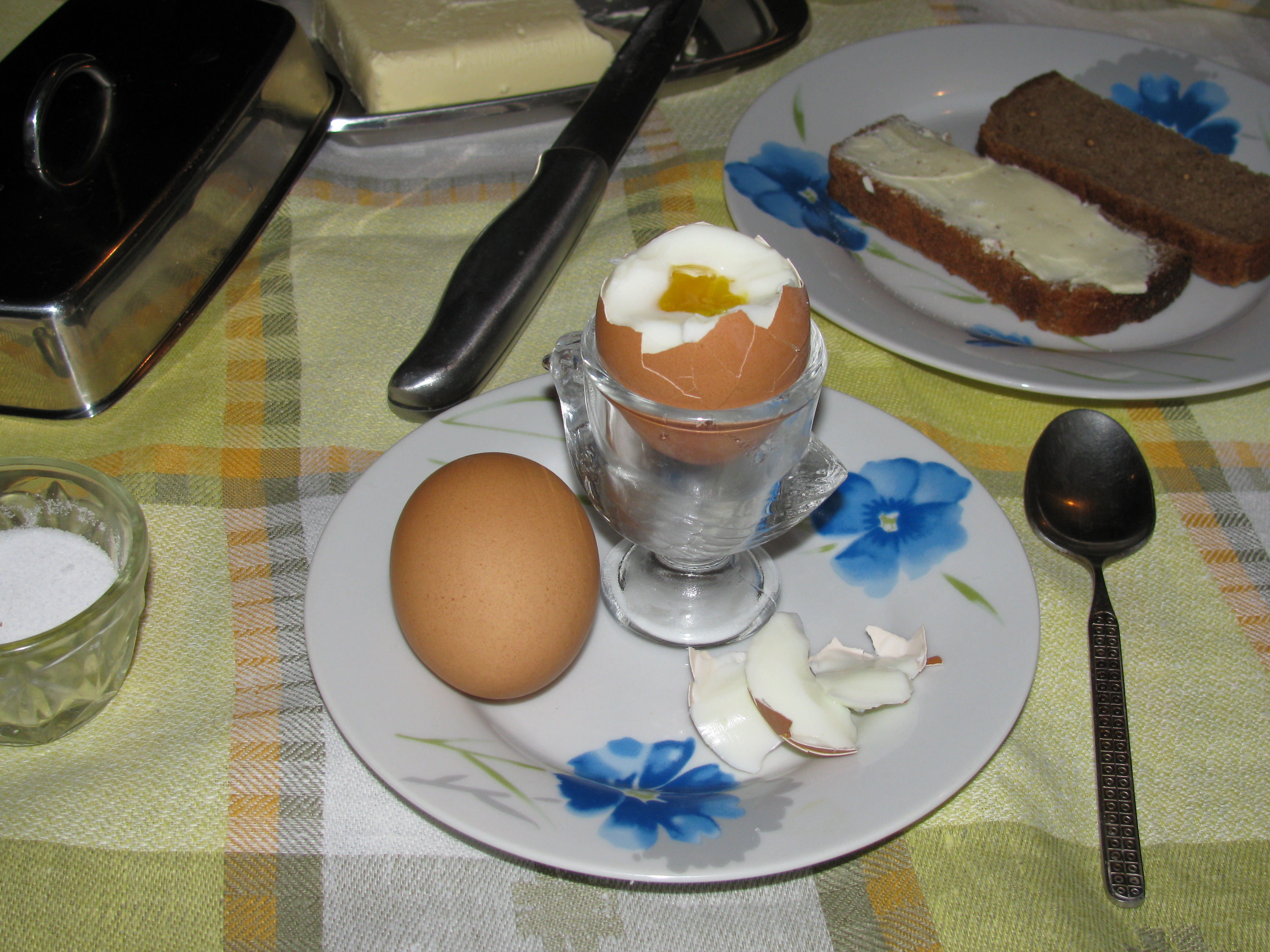 Яйце «зварене в мішечок», в пашотниці